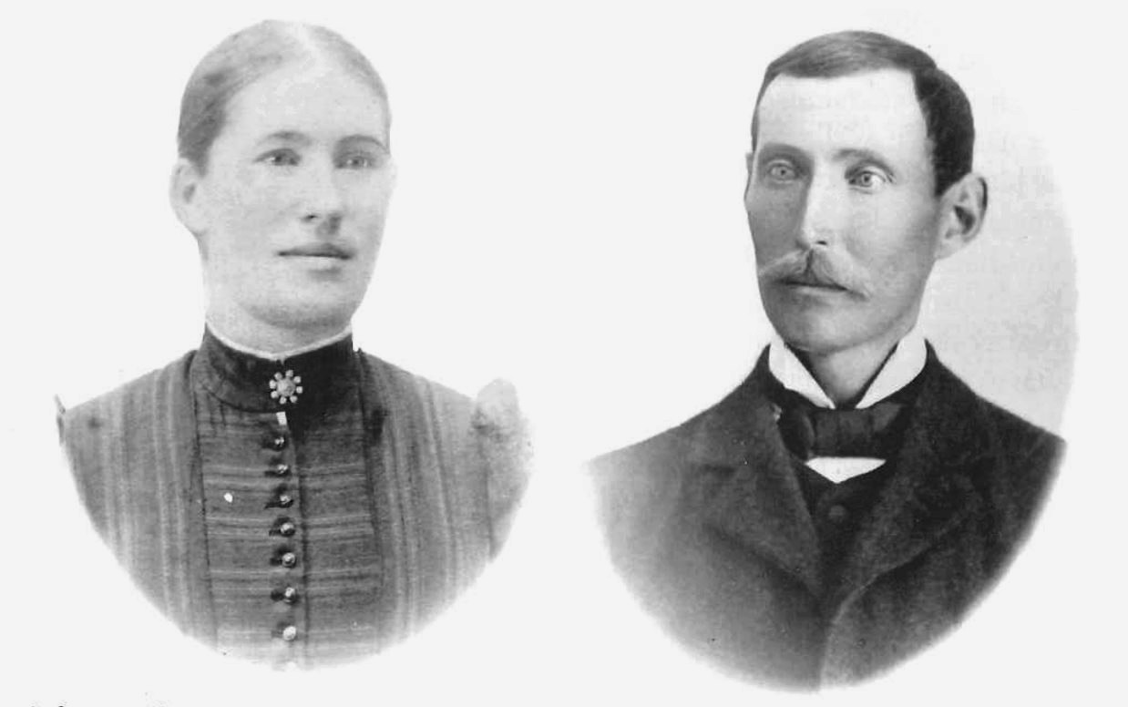 Johanna och Oscar Ström, boende på Bergholmstorpet på 19220-talet